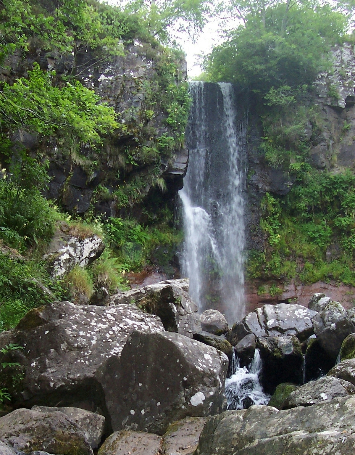 cascade du saut de la truie dans la vallée de Brezons